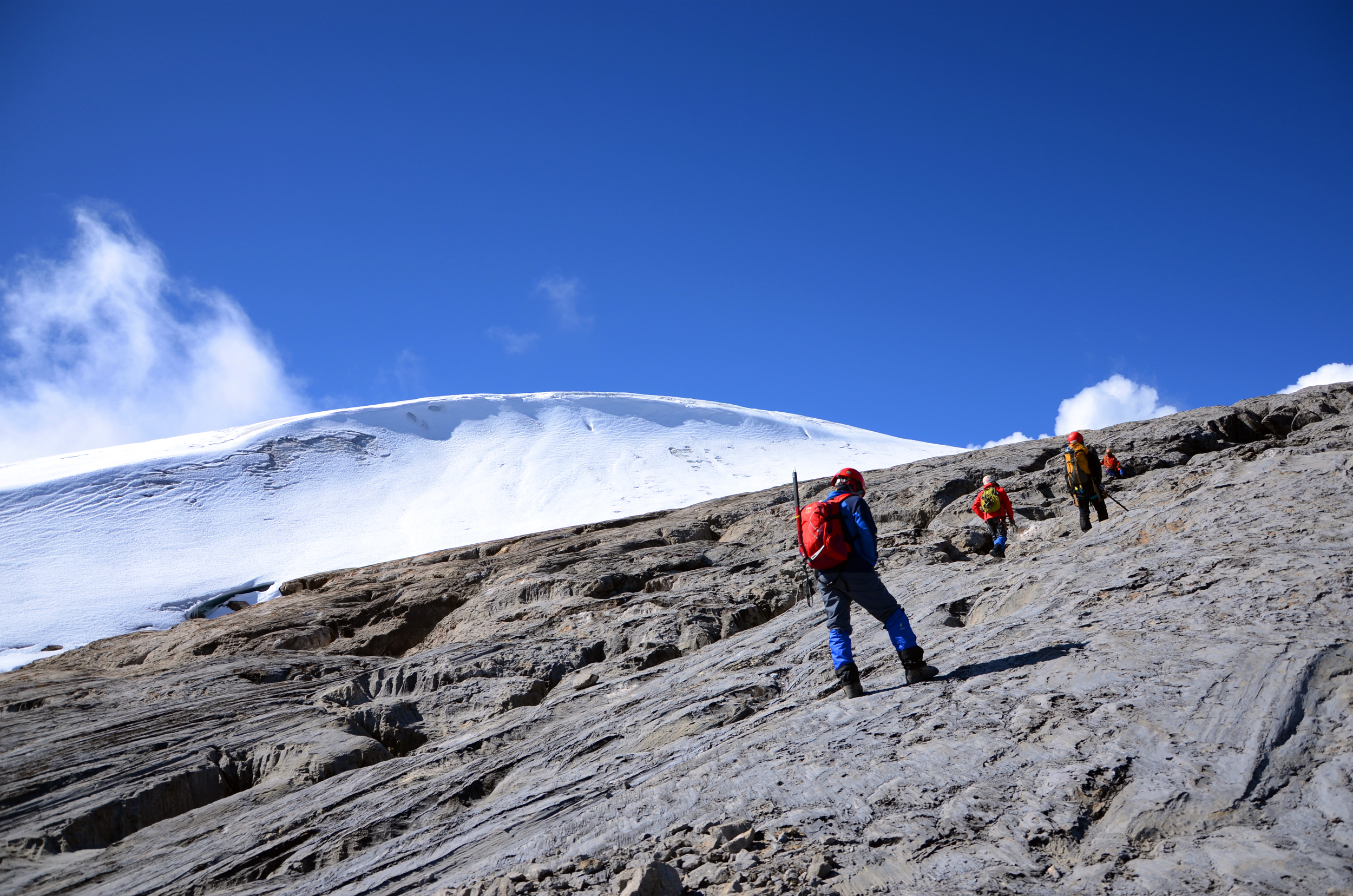 Pegunungan Sudirman di papua yang terdapat salju abadi dan merupakan gunung tertinggi di Indonesia.